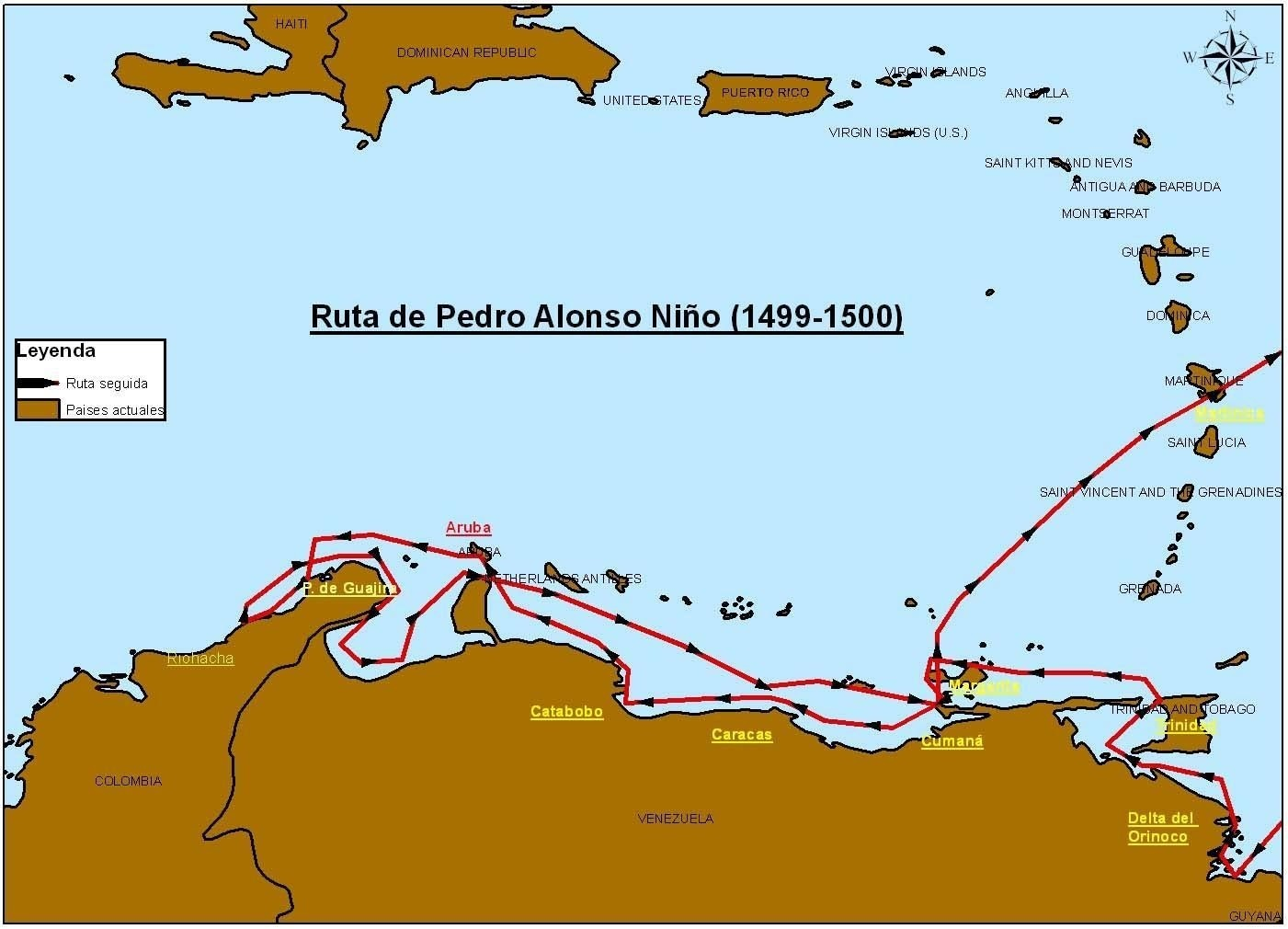 Plano de rutas de exploración de Pedro Alonso Niño.